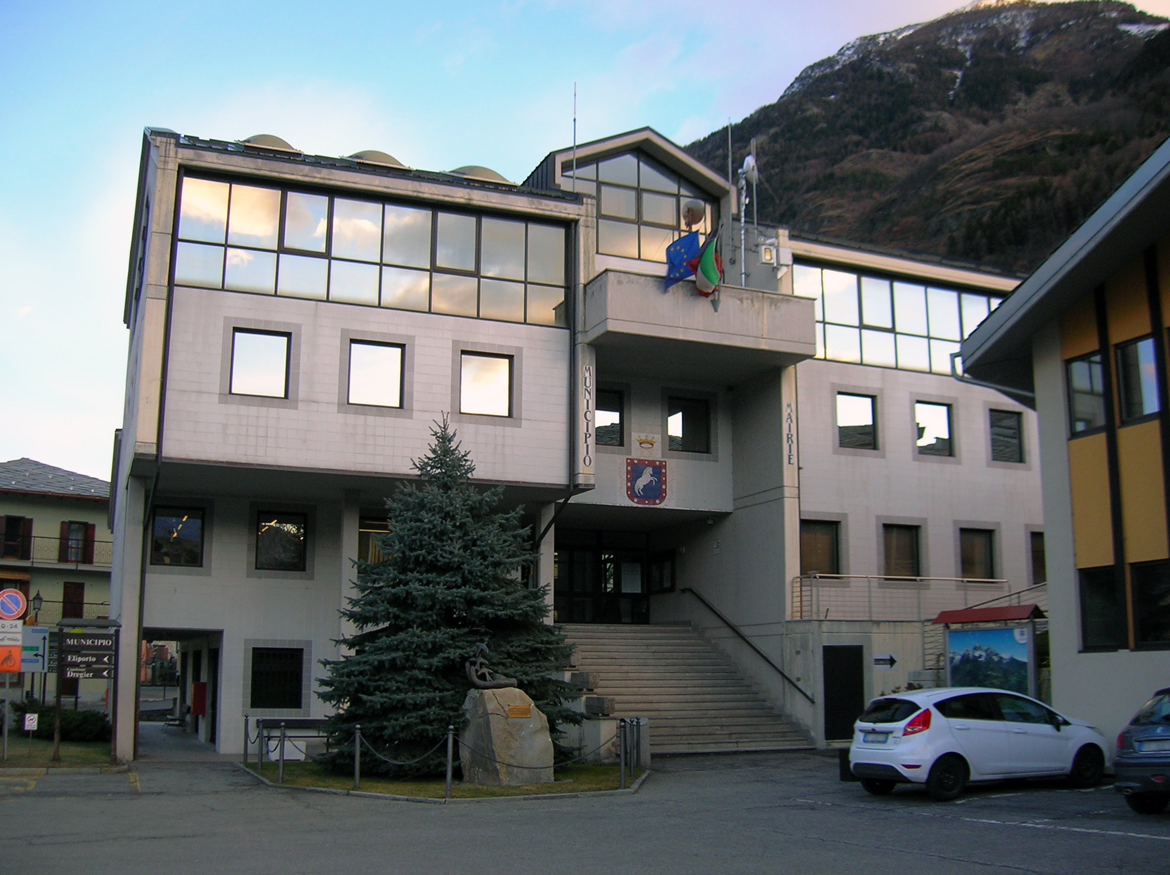 municipio di Pollein VdA Categoria:Valle d'Aosta